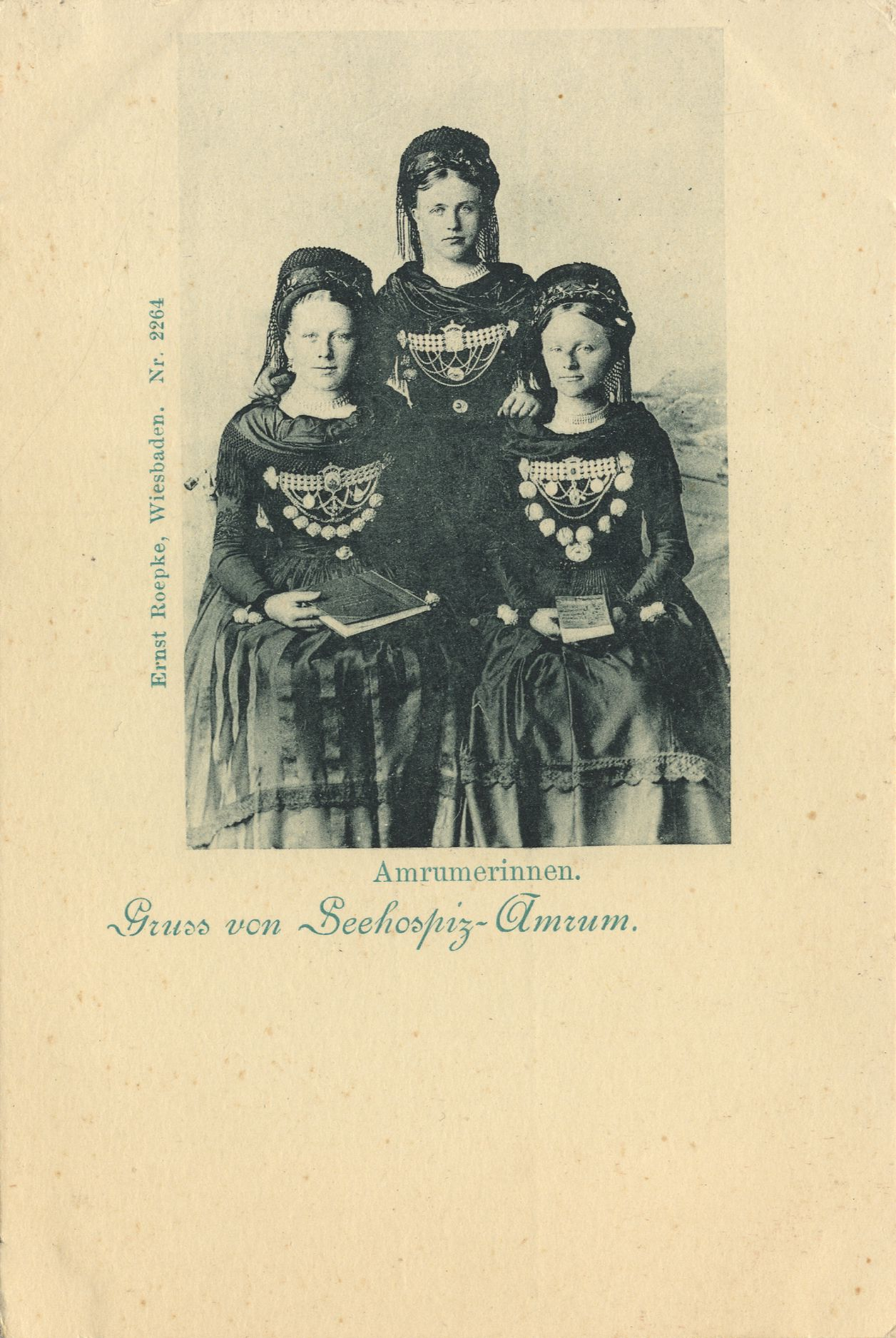 Amrumerinnen